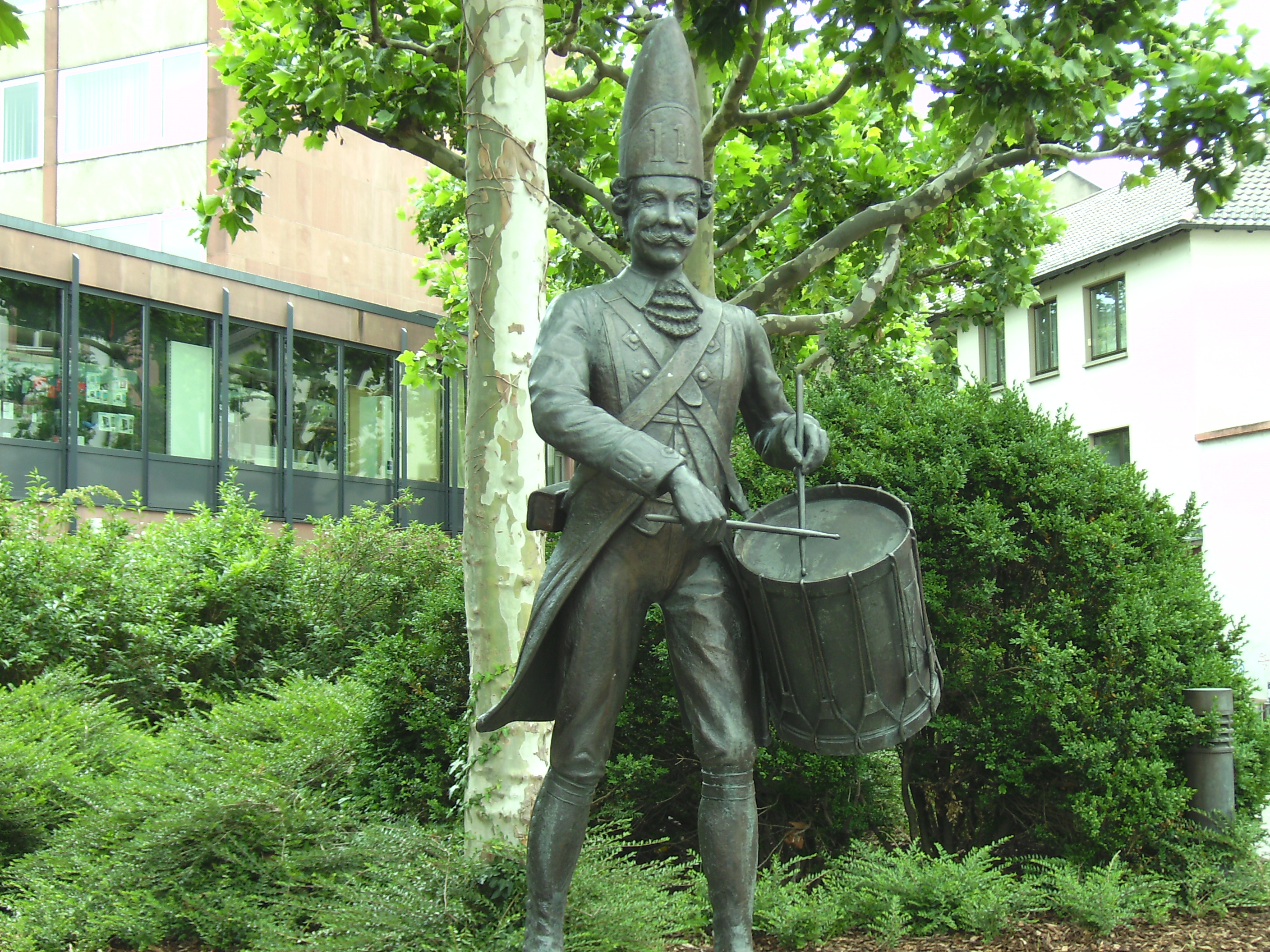 Gardetrommler (Bronze, 1995)